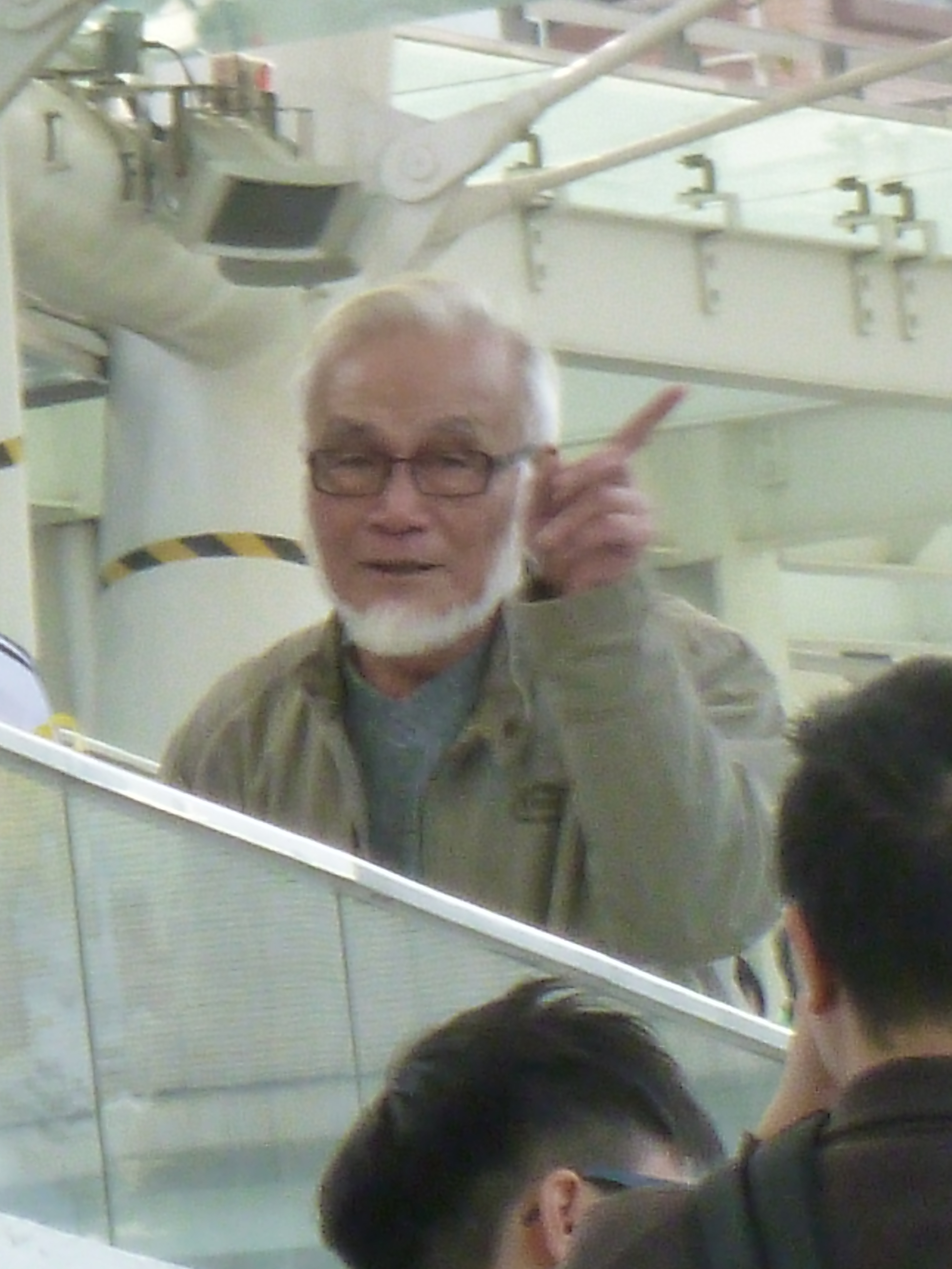 中文（香港）: 何鑑江 (19 Jan 2014, 香港甲組足球聯賽, 傑志 vs 飛馬, 旺角大球場)